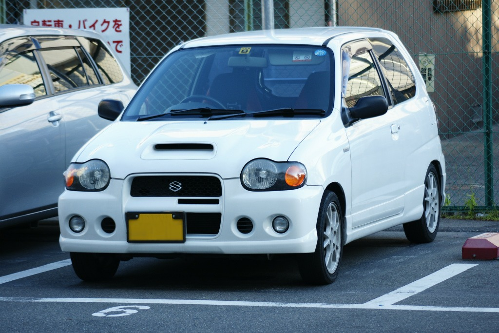 HA12S型アルトワークスです。投稿者が撮影。